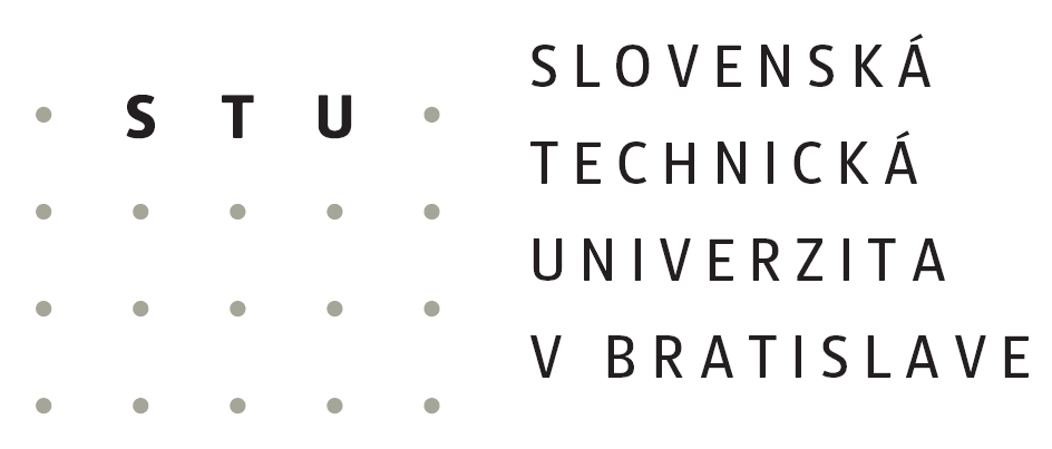 Logo: Slowakische Technische Universität Bratislava